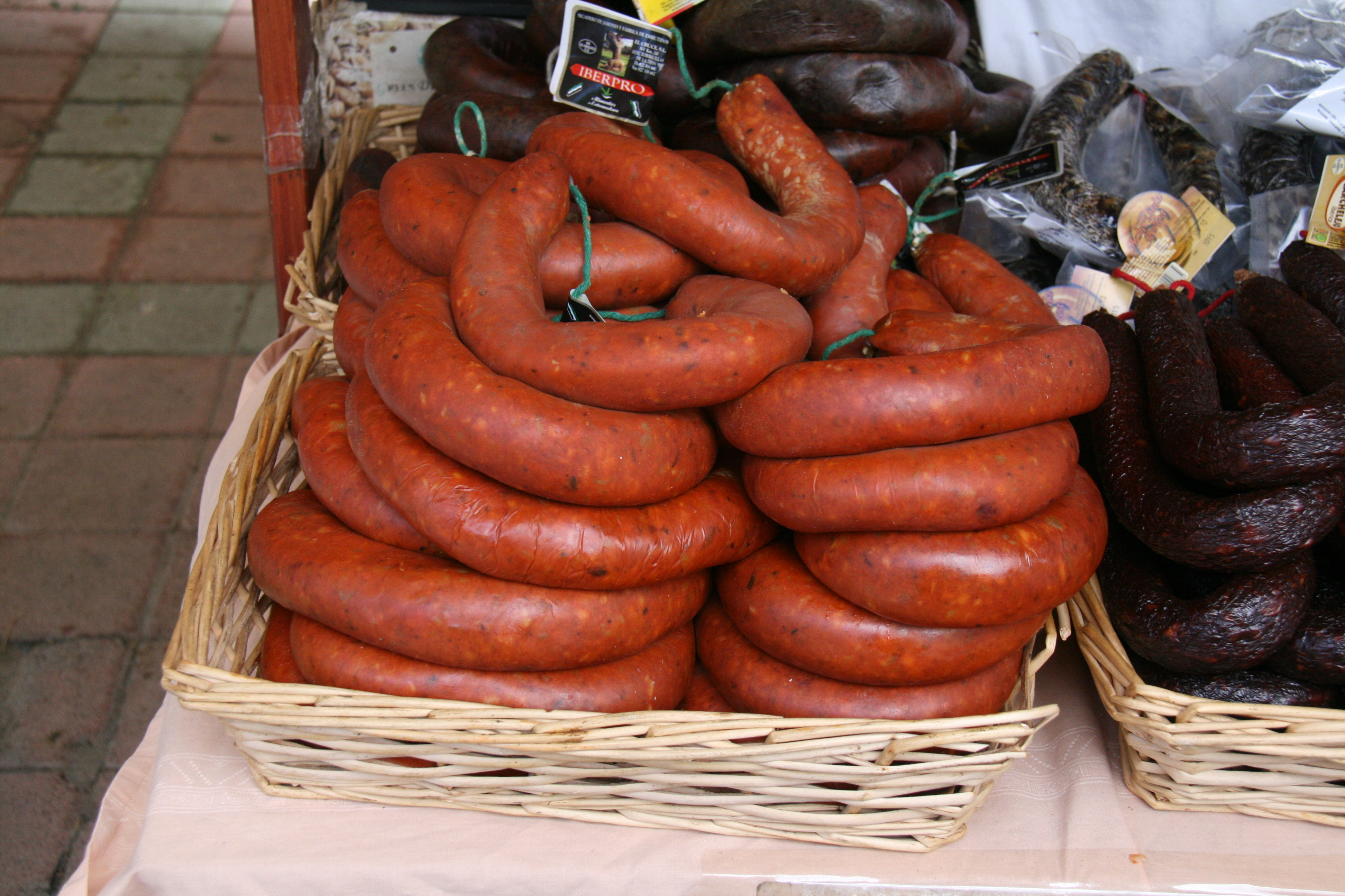 Morcilla extremeña